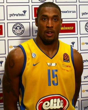 וויל סולומון, מתראיין אחרי משחק יורוליג